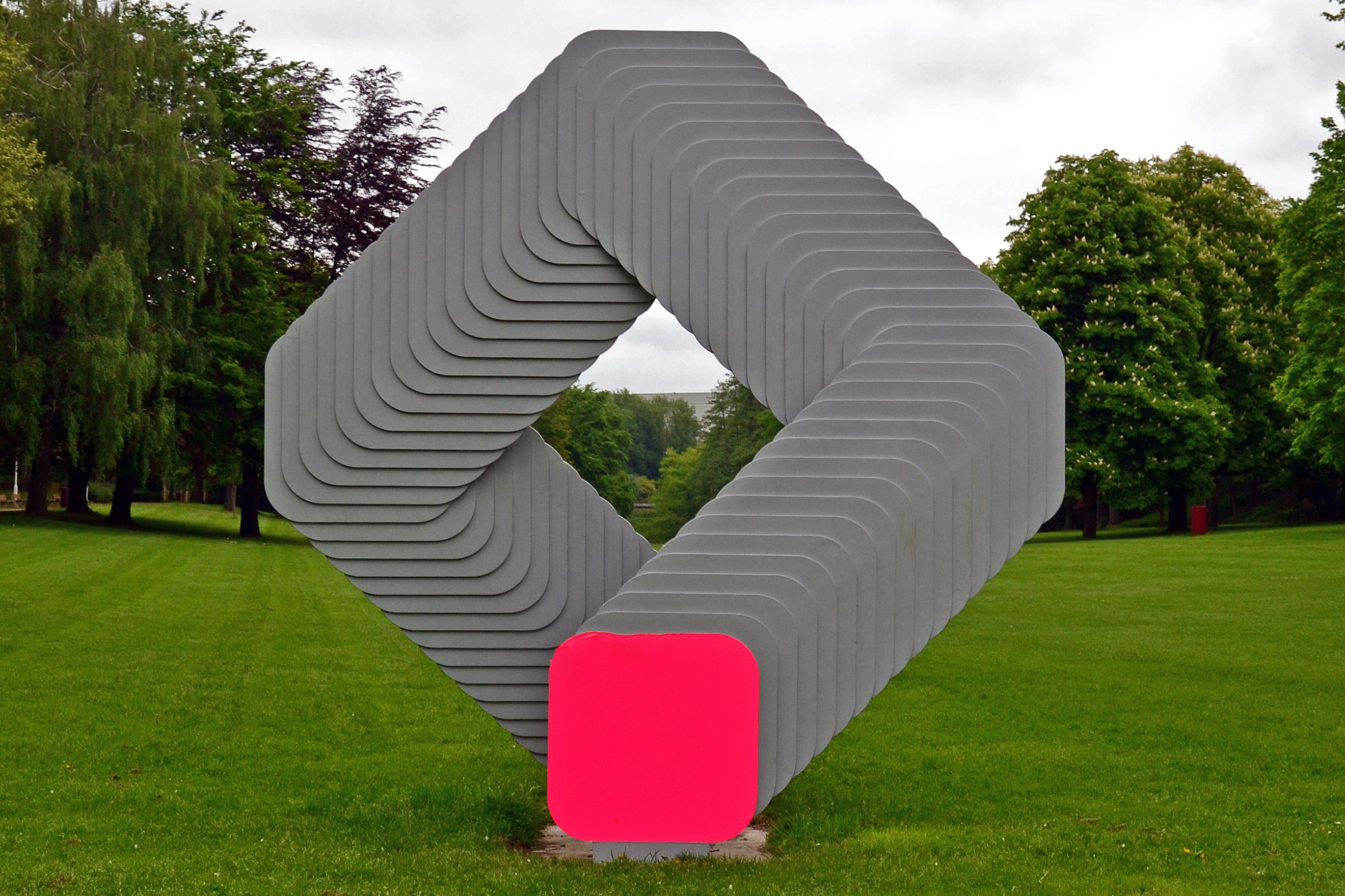 Skulpturen im Grugapark